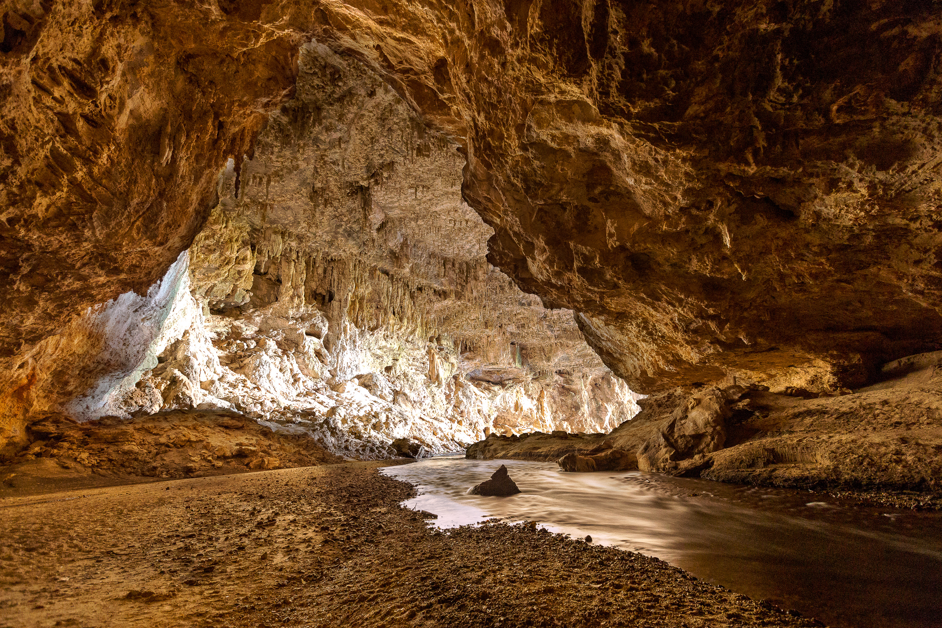 Interior da Caverna Terra Ronca - Parque Estadual Terra Ronca - São Domingos - GO - Brasil.